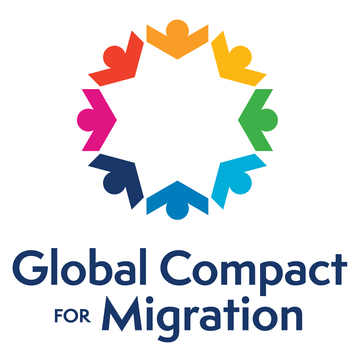 Von der UN für Öffentlichkeitsarbeit im Zusammenhang mit dem Abschluss des globalen Vertrages für sichere, geordnete und geregelte Migration verwendetes Logo